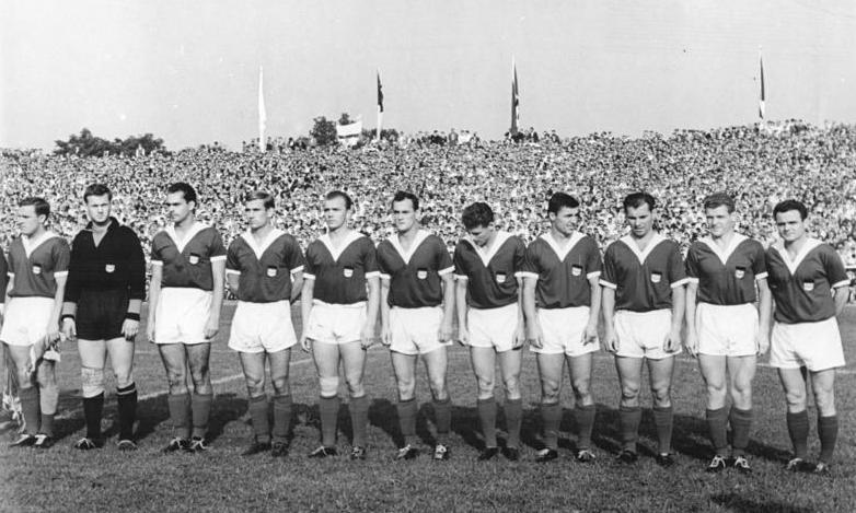 Zentralbild-Kohls Tre-Qu 23.9.1963 Fußball: Olympiaauswahl vertritt gemeinsame deutsche Mannschaft. 1:2-Niederlage im zweiten Spiel. Die Fußball-Olympiaauswahl der DDR hat sich am 22.9.1963 vor 30 000 Zuschauern im Niedersachsenstadion zu Hannover für die gemeinsame deutsche Olympiamannschaft qualifiziert. Die Spieler um Kapitän Jürgen Nöldner verloren zwar die 2. Begegnung gegen die westdeutsche Olympiaauswahl mit 1:2, doch hatten sie vor einer Woche in Karl-Marx-Stadt mit 3:0 gewonnen und blieben deshalb mit einem Torverhältnis von 4:2 Gesamtsieger. UBz. Die DDR-Olympia-Elf spielte in der gleichen Besetzung wie in Karl-Marx-Stadt (unser Bild). V.l.n.r.: Nöldner, Heinsch, Kleiminger, Pankau, Urbanczyk, Frässdorf, Stöcker, Nachtigall, Unger, Liebrecht und Wacker.